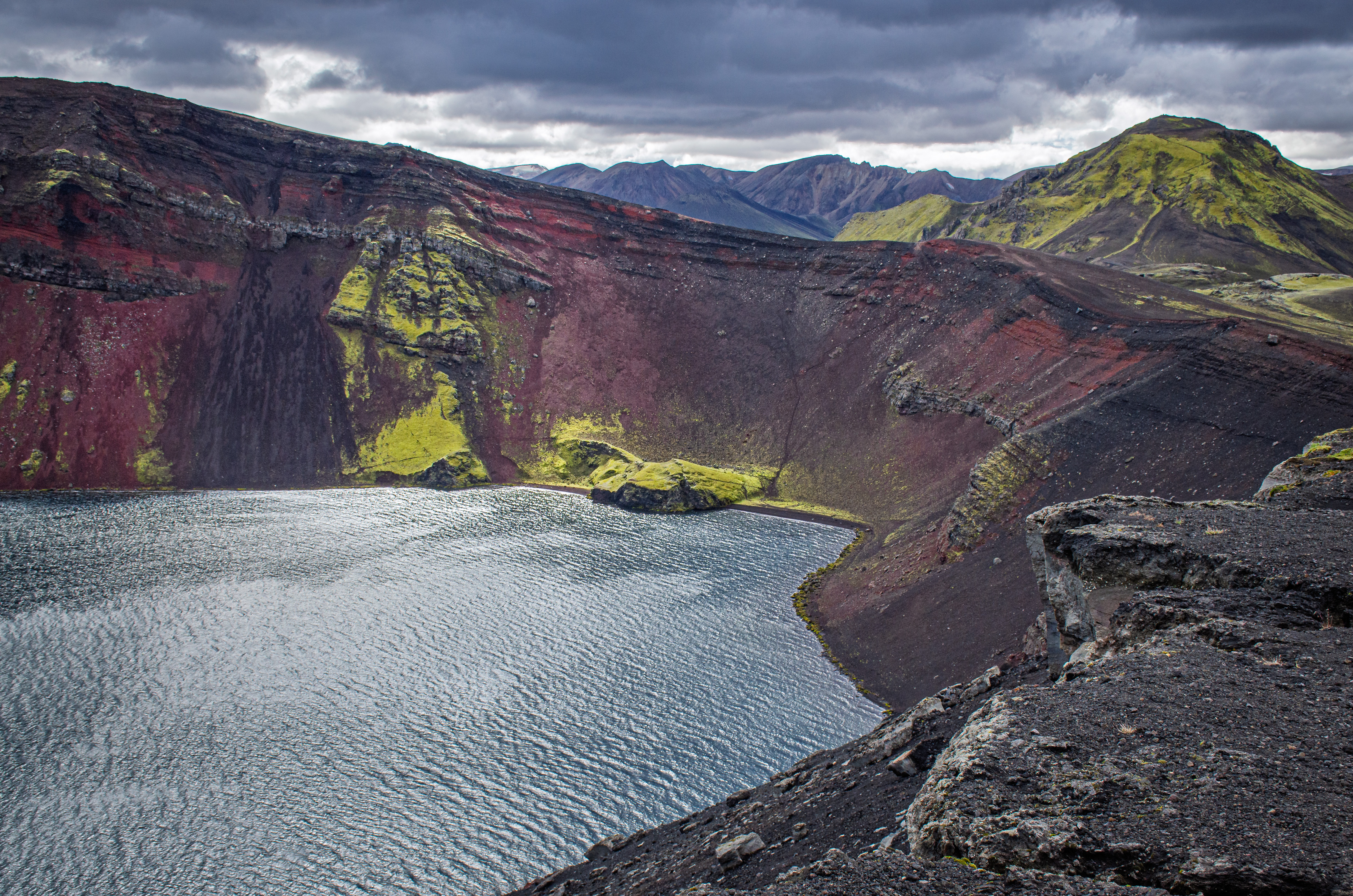 Ljótipollur, Island/Iceland